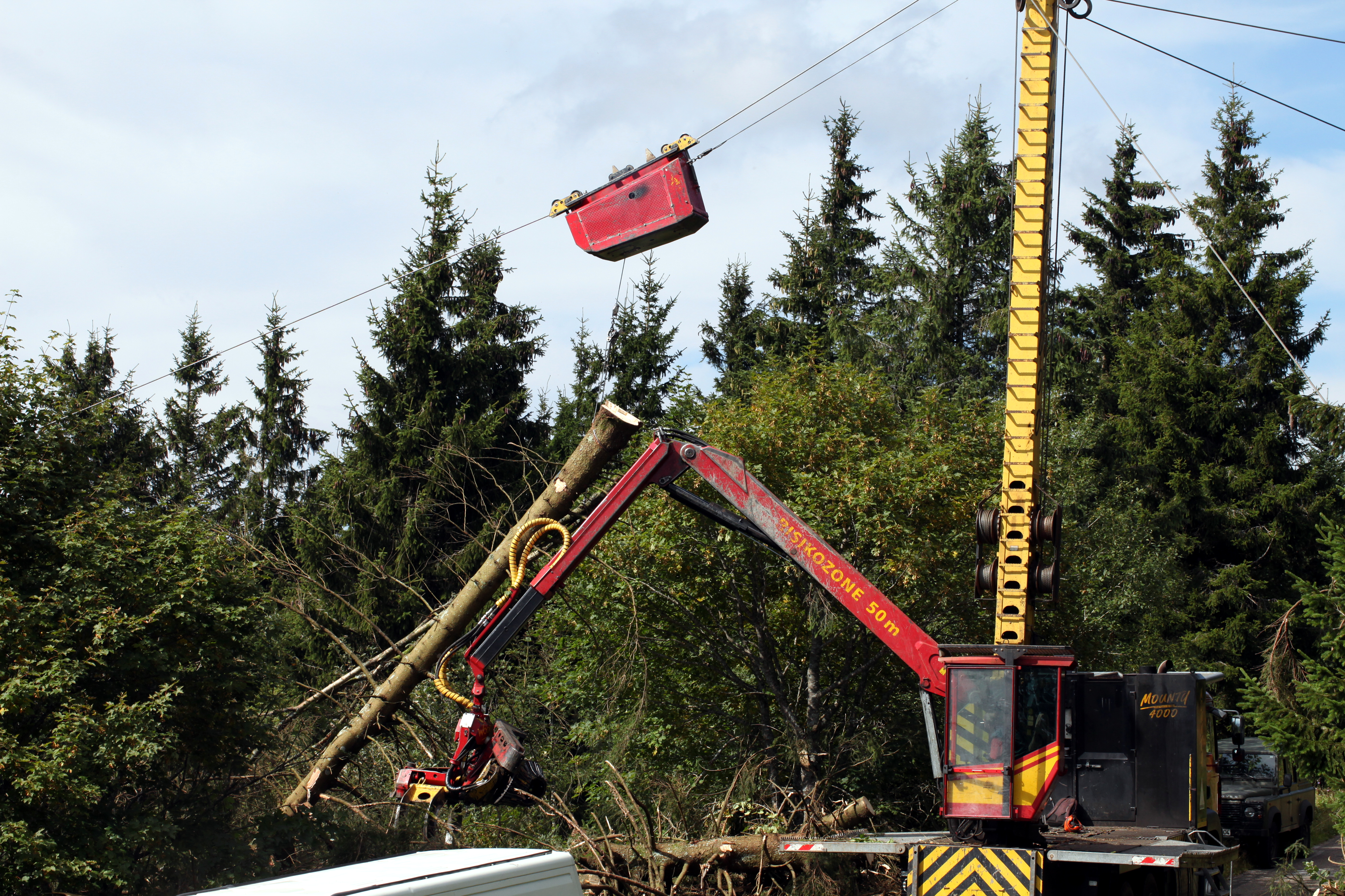 Débardage par cable au Ballon de Servance.